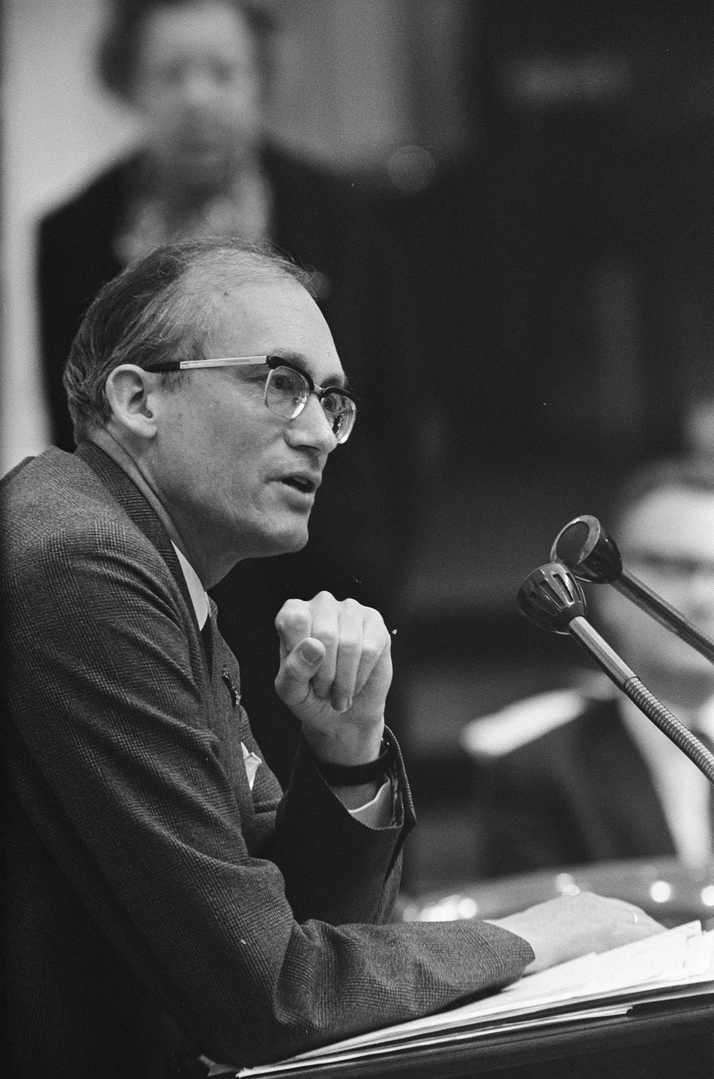 Collectie / Archief : Fotocollectie Anefo Reportage / Serie : [ onbekend ] Beschrijving : Minister van Financien Witteveen licht de Tweede Kamer in over gang van zaken van effecten uit Tweede Wereldoorlog Datum : 5 februari 1970 Locatie : Den Haag, Zuid-Holland Trefwoorden : ministers, parlementaire debattten, politiek Persoonsnaam : Witteveen, H.J. Fotograaf : Koch, Eric / Anefo Auteursrechthebbende : Nationaal Archief Materiaalsoort : Negatief (zwart/wit) Nummer archiefinventaris : bekijk toegang 2.24.01.05 Bestanddeelnummer : 923-2205